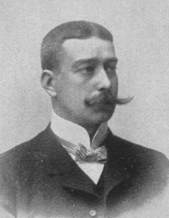 Bruno Büchner, deutscher Radrennfahrer